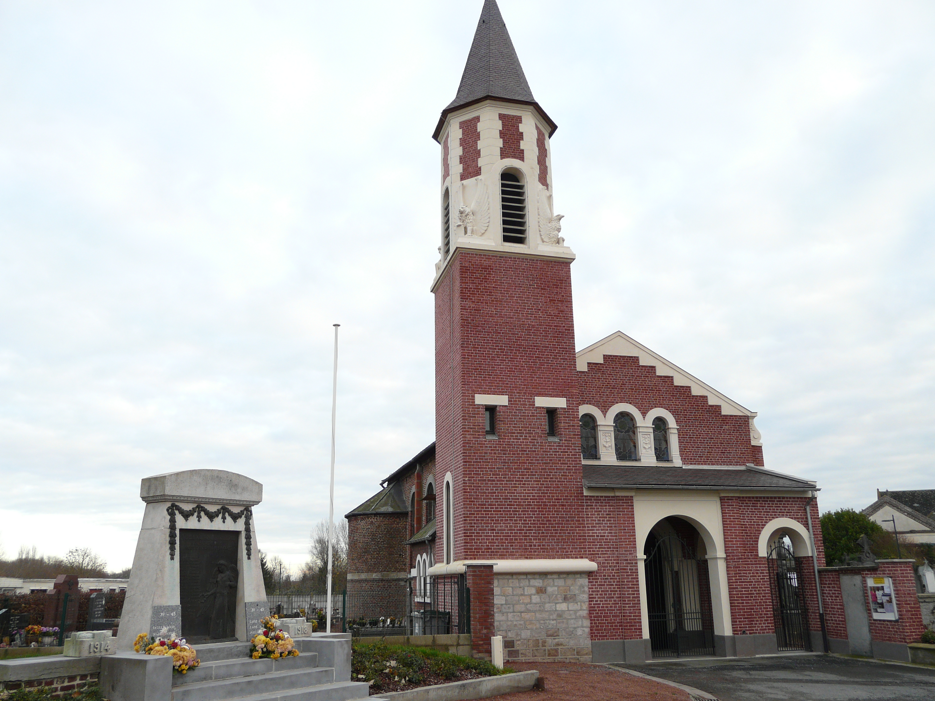 L'église d'Aubencheul-au-Bac (Nord)